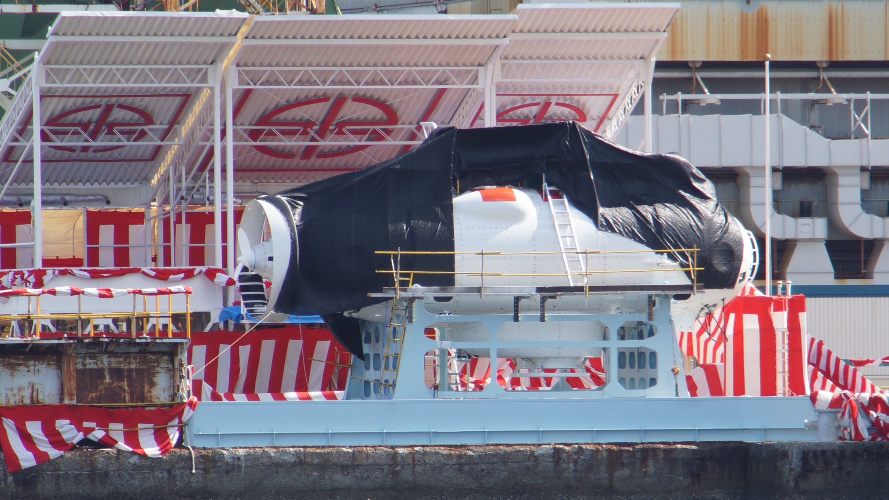 海上自衛隊 潜水艦救難艦ちよだ（ASR-404）に搭載予定の深海救難艇（DSRV） 右舷後部。2017年9月2日 川崎重工神戸工場にて。